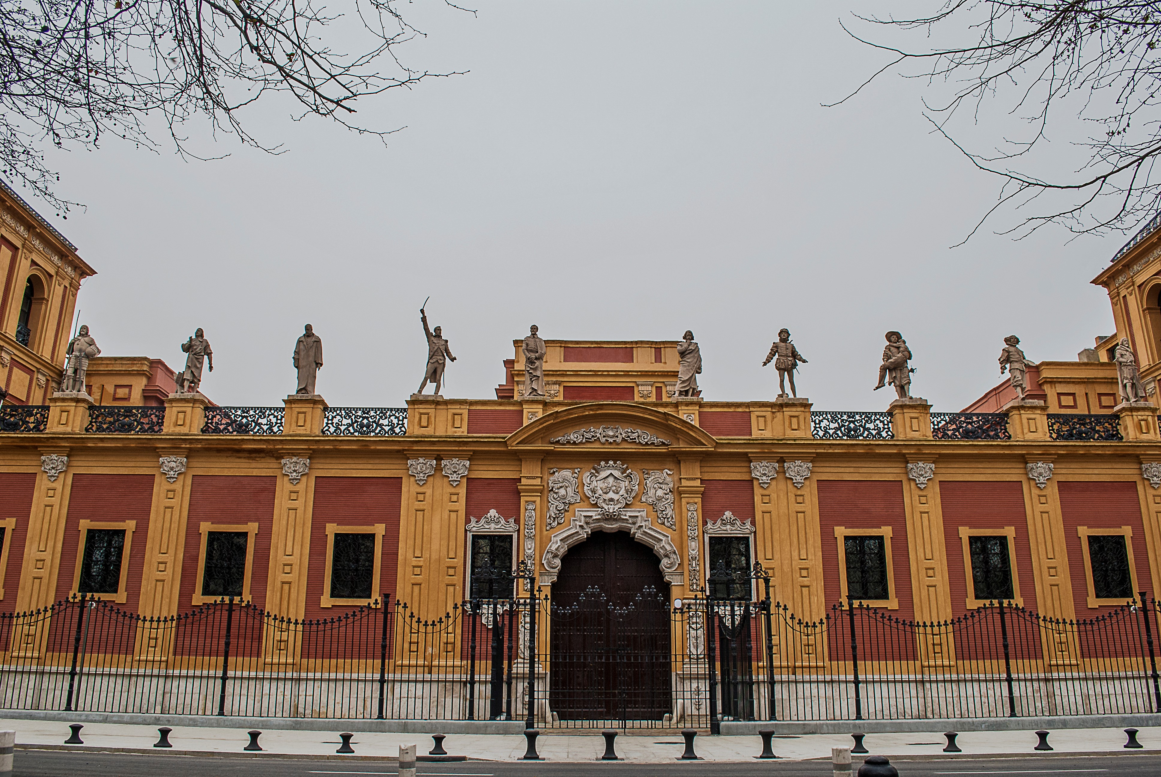 Fachada lateral del Palacio de San Telmo, Sevilla, con galería de sevillanos ilustres.